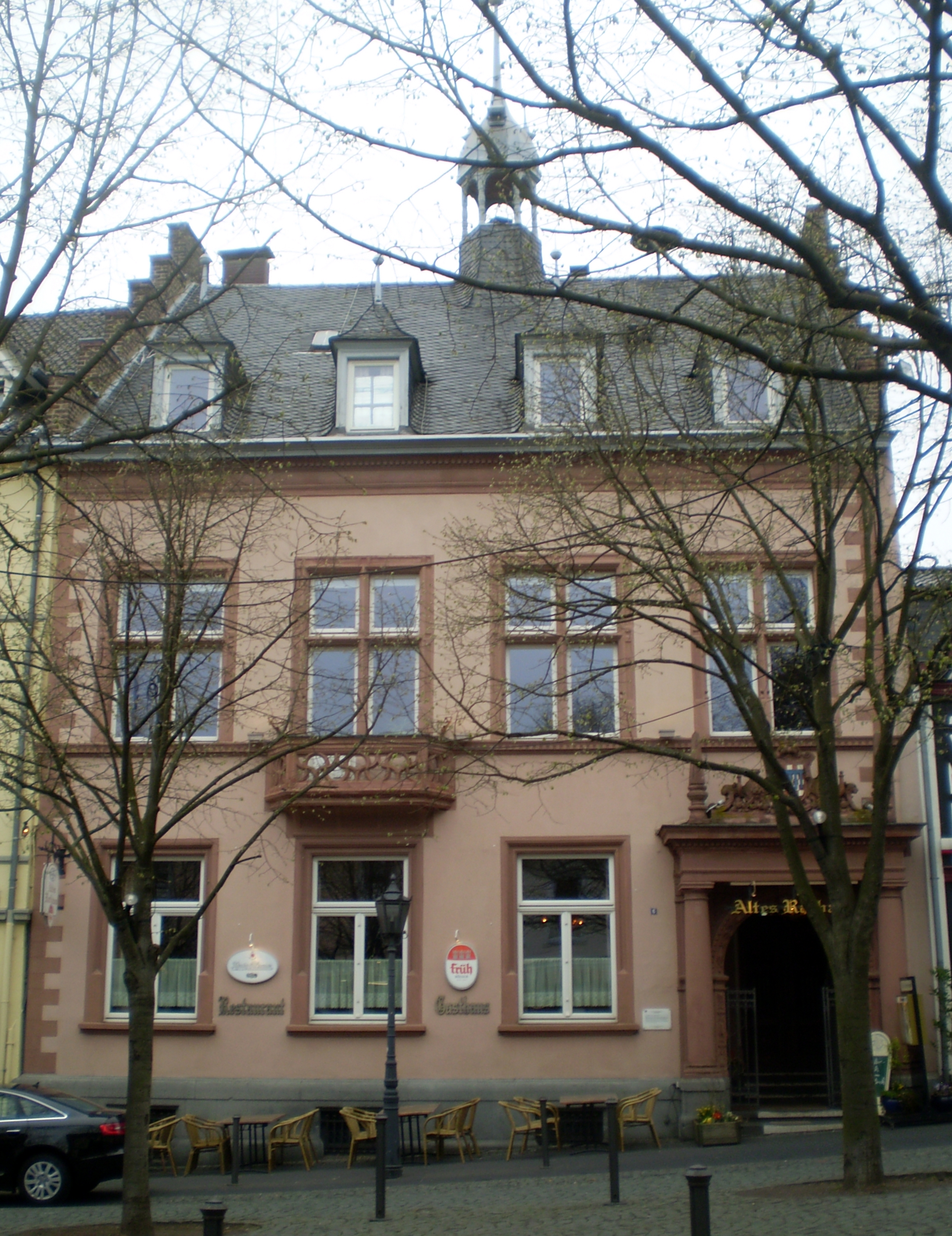 Ehemaliges Rathaus, Markt 6, Bad Honnef This is a photograph of an architectural monument. 121